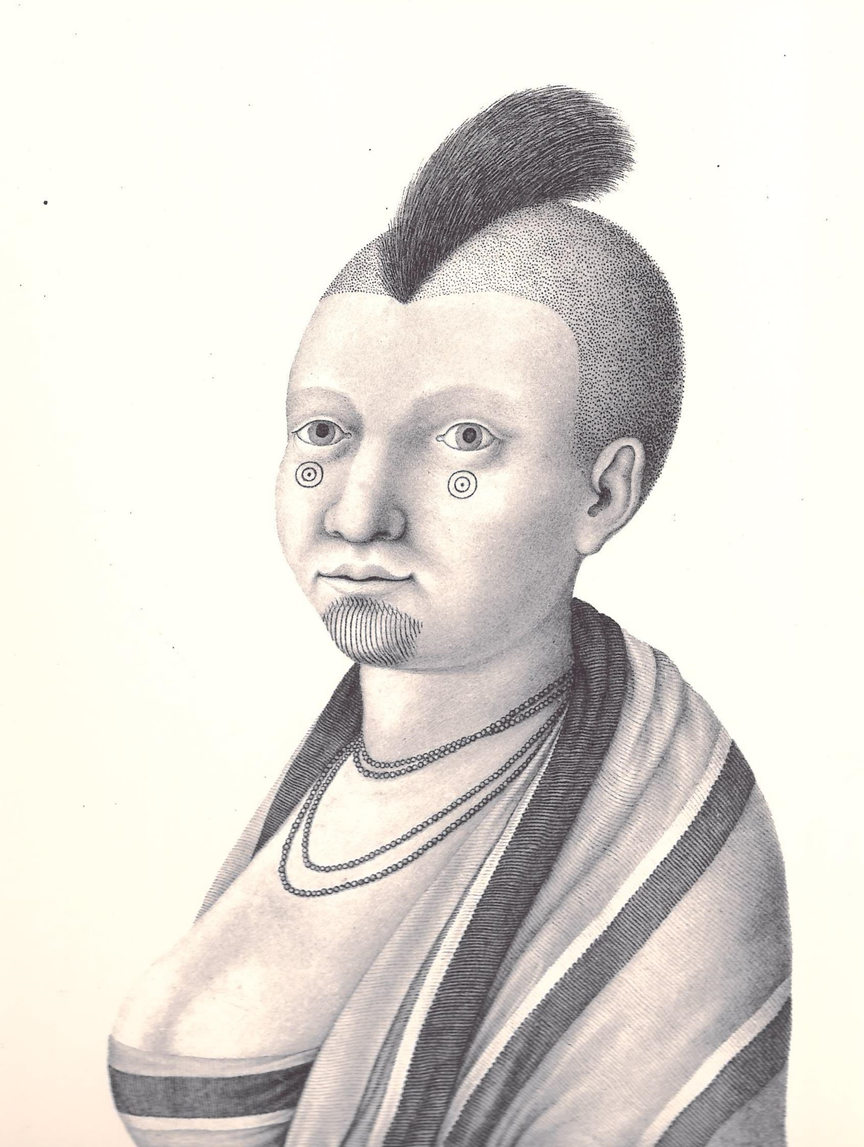 Ilustração em Viagem Filosófica pelas capitanias do Grão Pará, Rio Negro, Mato Grosso e Cuiabá.